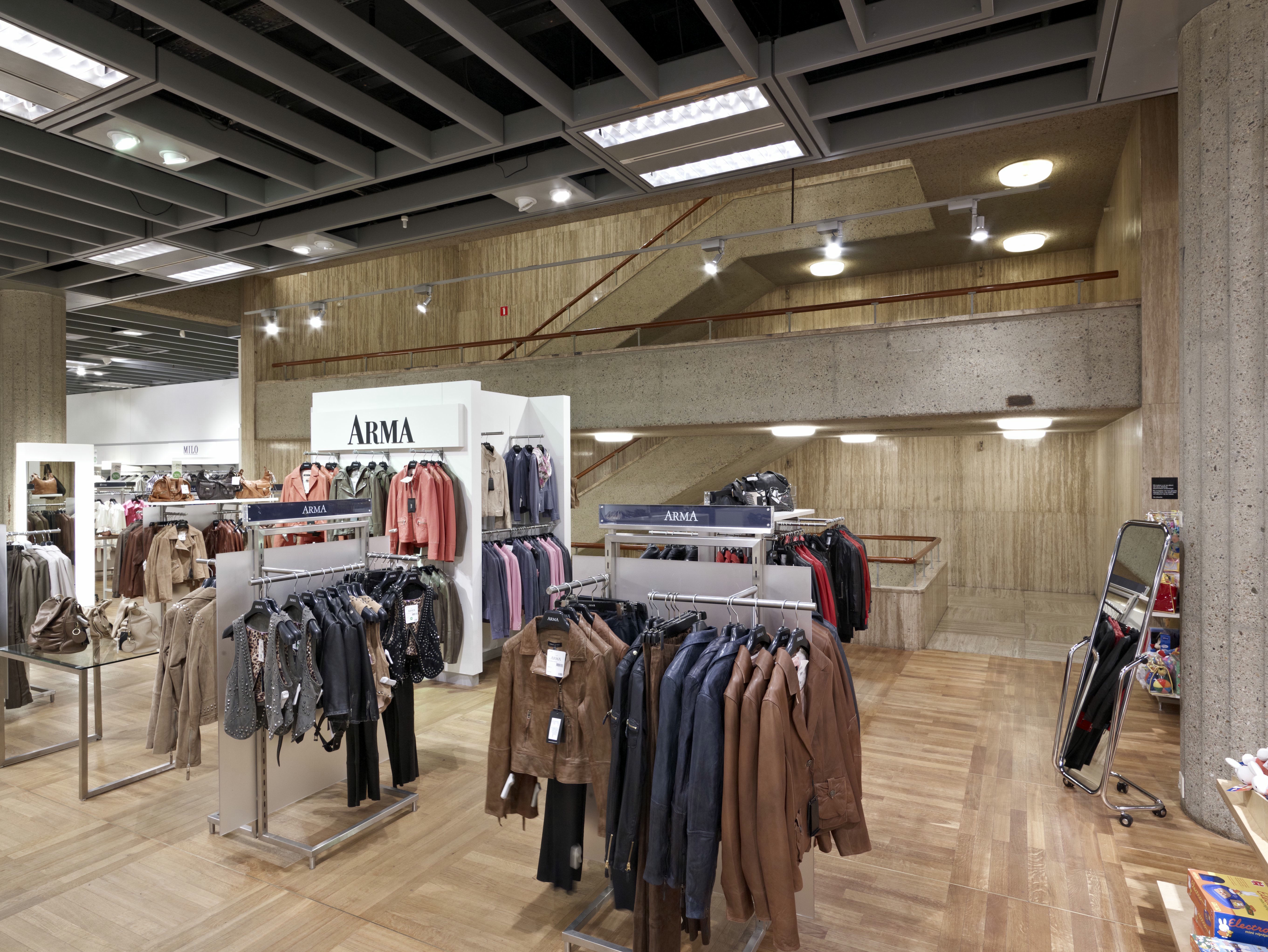 De Bijenkorf: Interieur, aanzicht trappenhuis